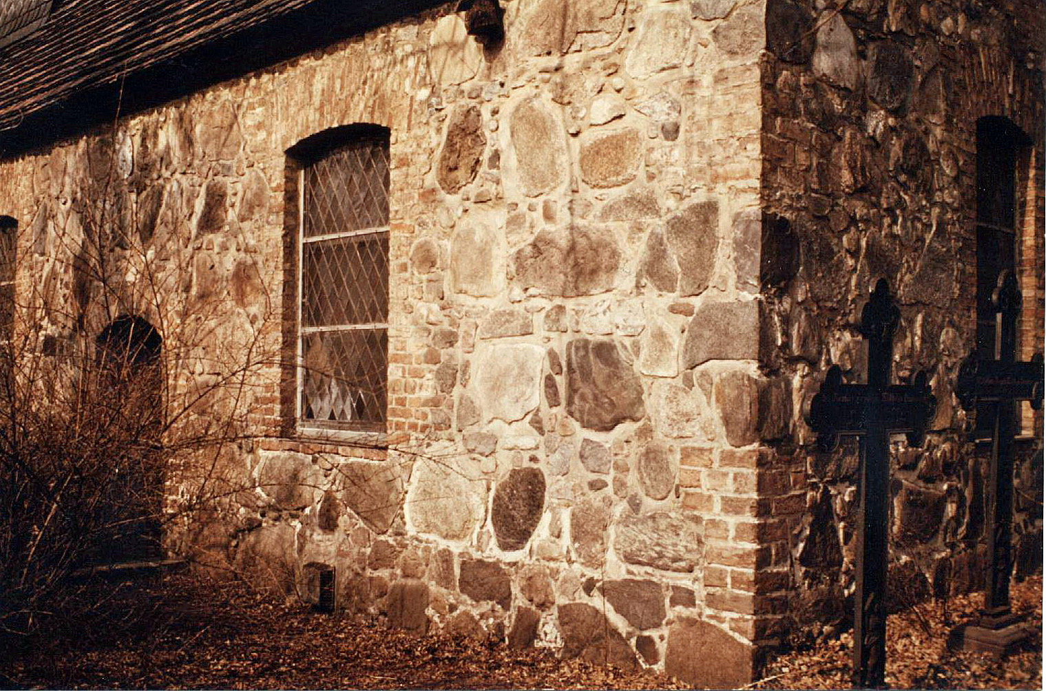 Das Foto zeigt die Südostecke der Dorfkirche Wittenau und das an sie grenzende Mischmauerwerk.